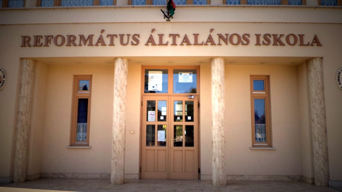 Református Általános Iskola, Cegléd